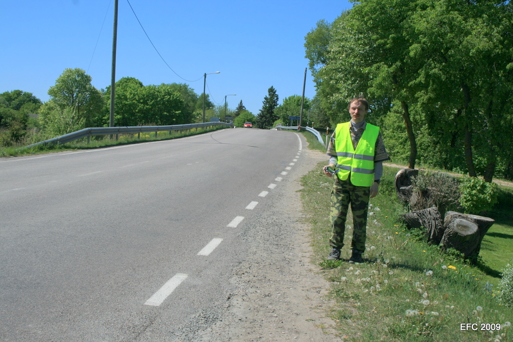 Nasva sild, jalgrattamatk